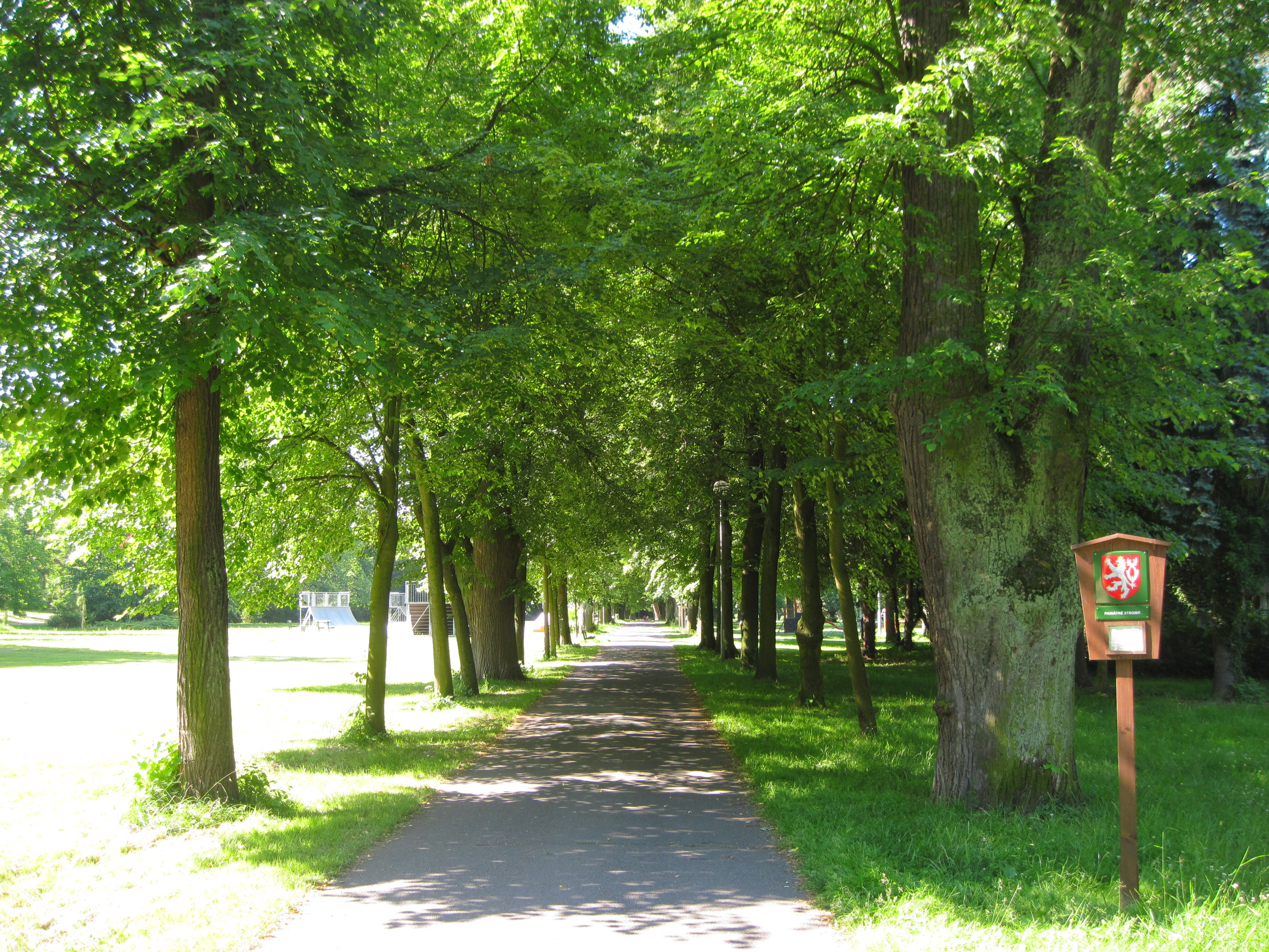 pohled od zámku Project: Chráněná území.